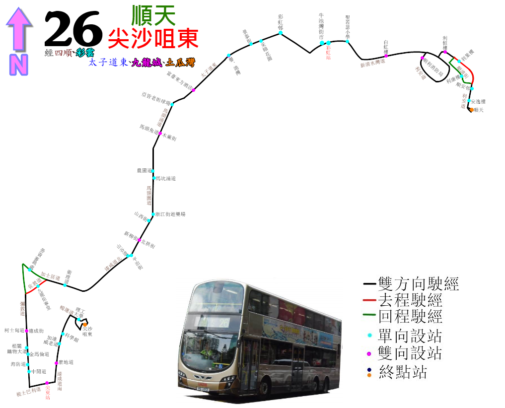 中文（香港）: 九巴26號線的走線圖